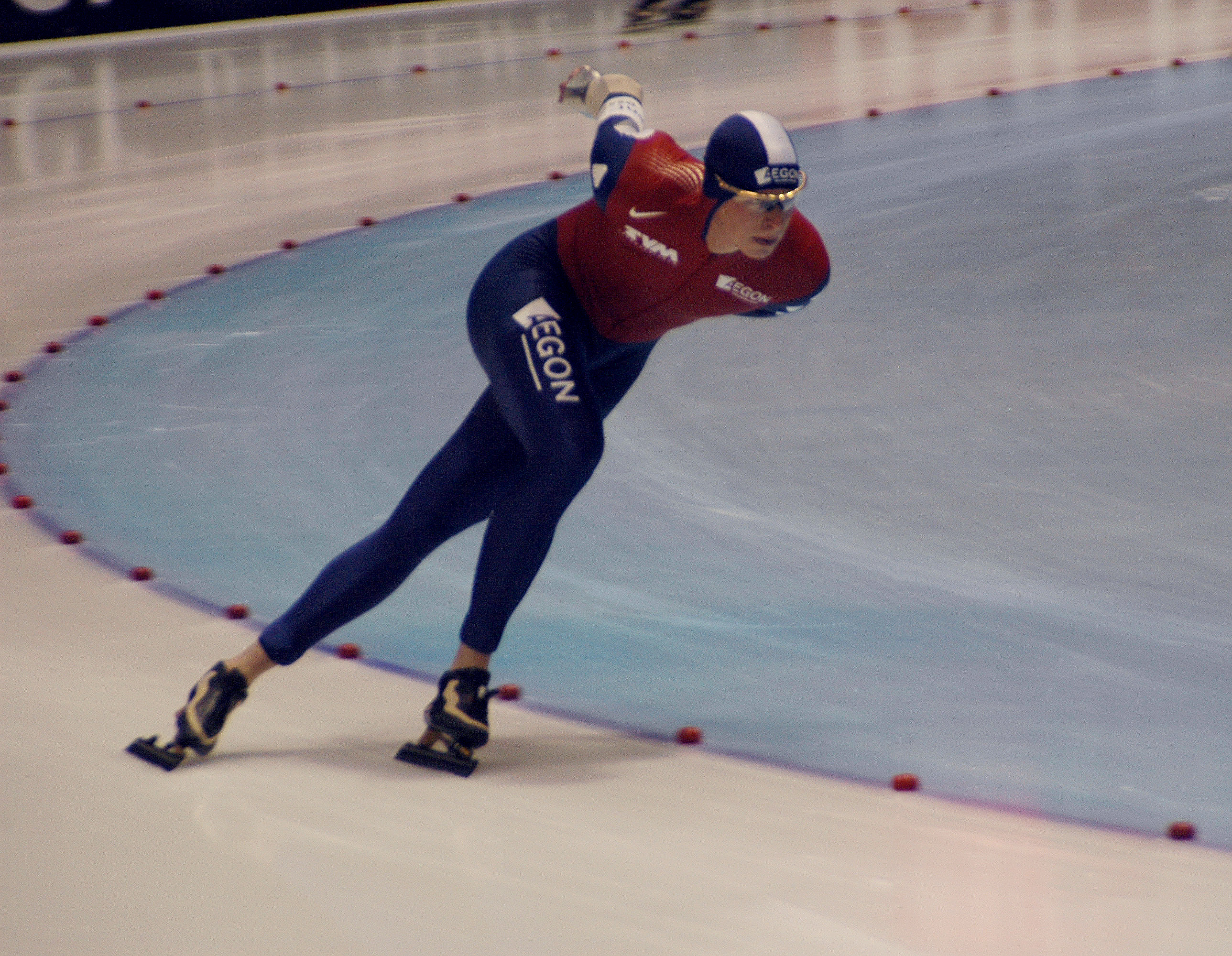 Sven Kramer @ WorldCup